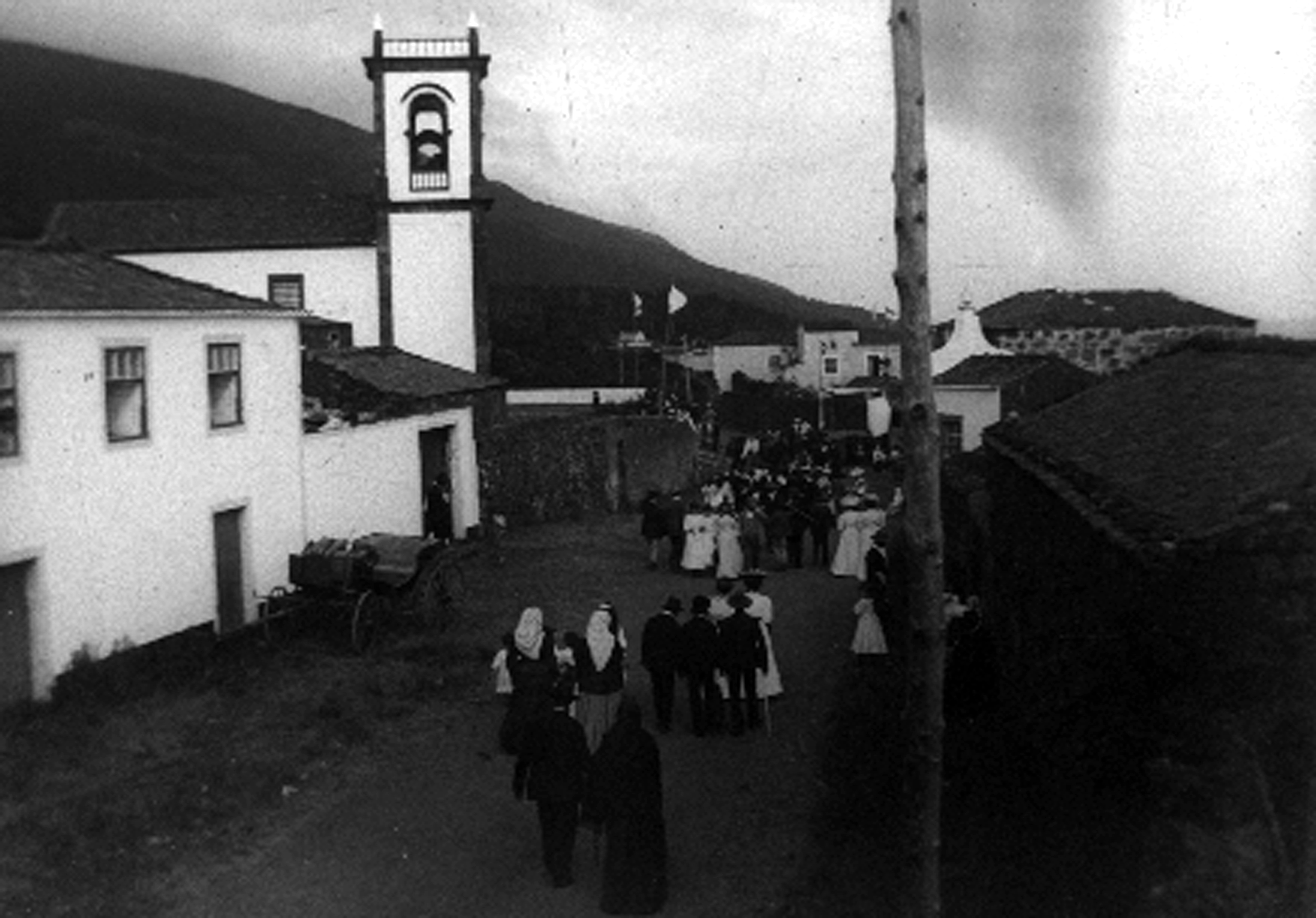 Urzelina, ilha de São Jorge, 1910, festas populares, Arquivo de Villa Maria, Angra do Heroísmo, ilha Terceira, Açores